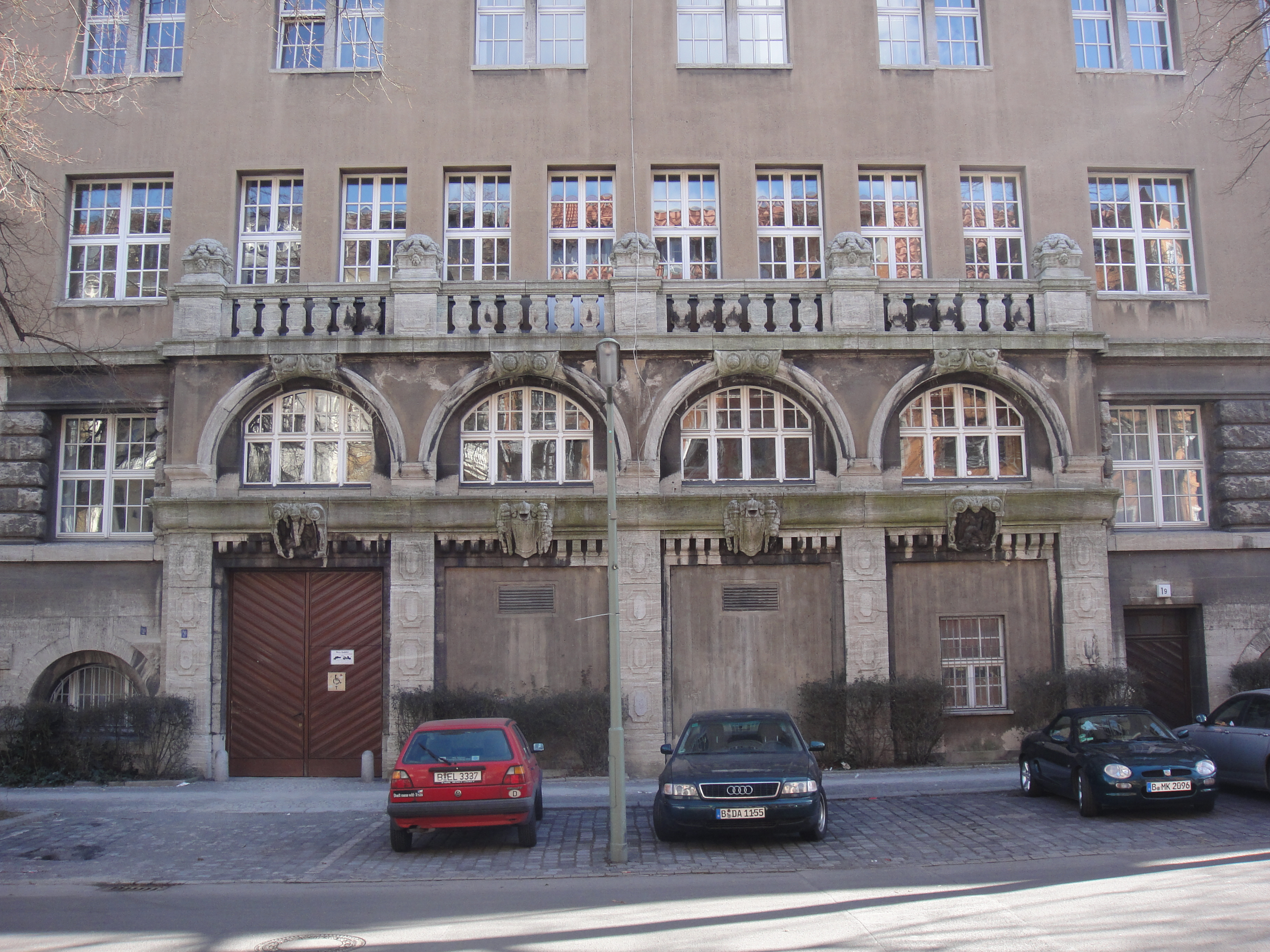 Alte Feuerwache im Rathaus Friedenau